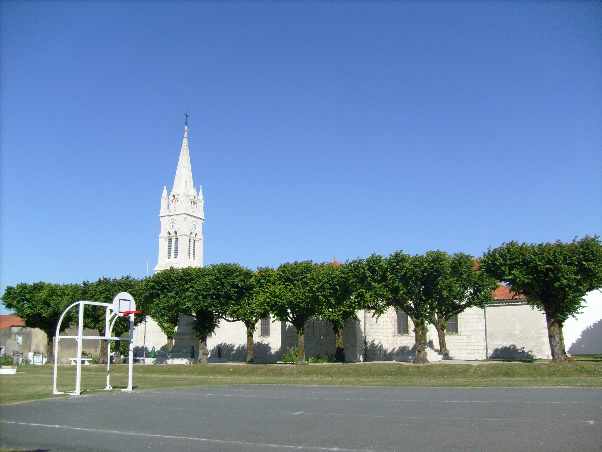 Place du village de Semussac